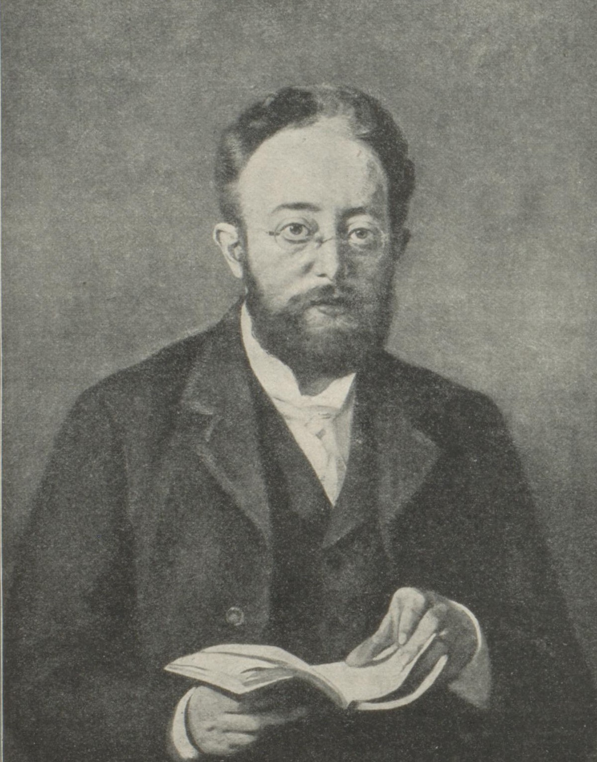 Reproduktion von Julius Tischmeyer (1854-1916): Porträt von Samuel Lublinski